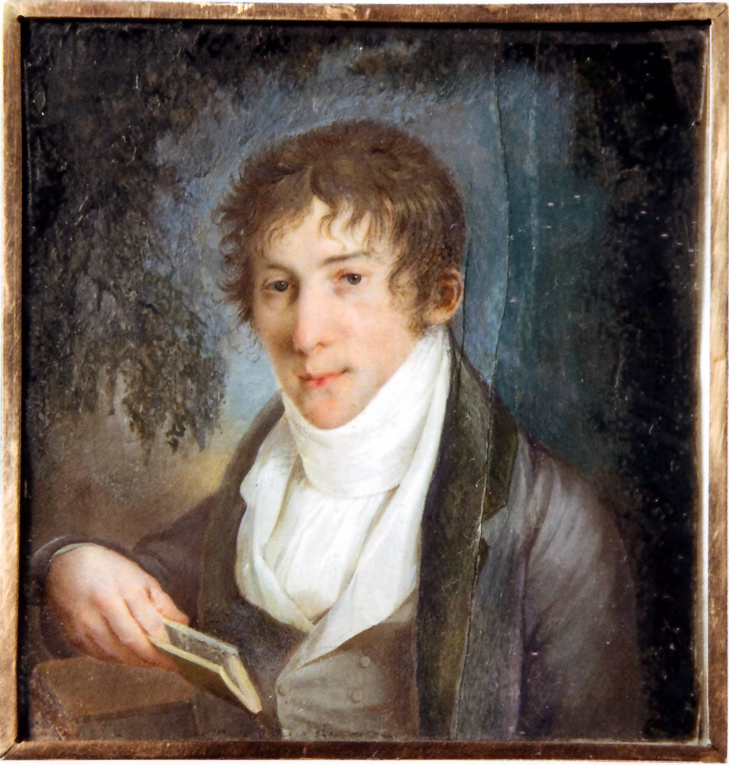 Кирилл Александрович Нарышкин. Худ. П. Росси. Коллекция Подстаницких